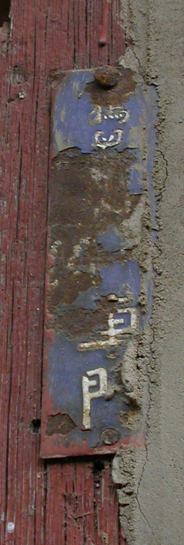 鸦儿胡同老门牌，自拍，本图片不允许百度百科使用